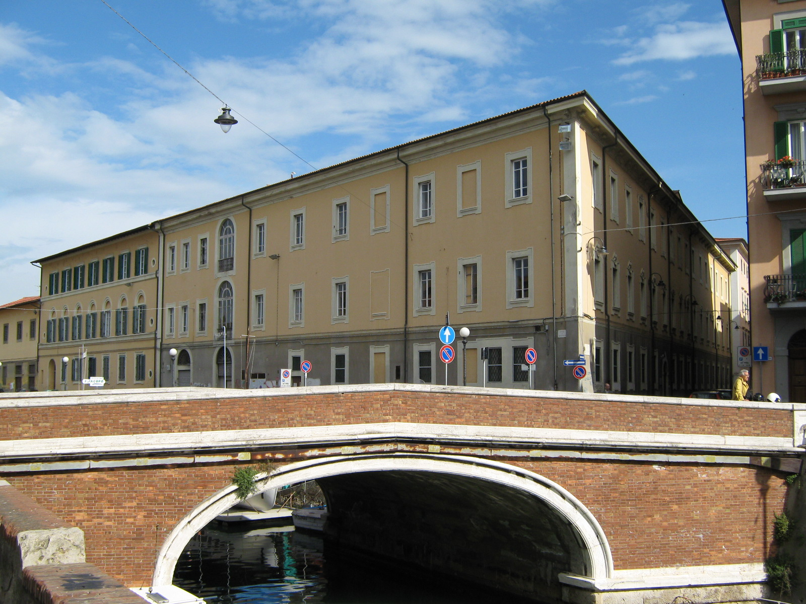 Livorno: Il Palazzo di Giustizia nel quartiere della Venezia Nuova.